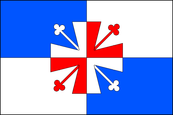 vlajka, Skalička, okres Přerov